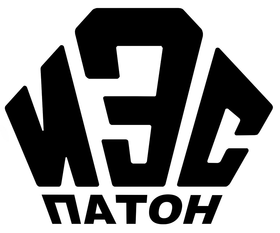 Логотип ИЭС им. Е.О. Патона НАН Украины